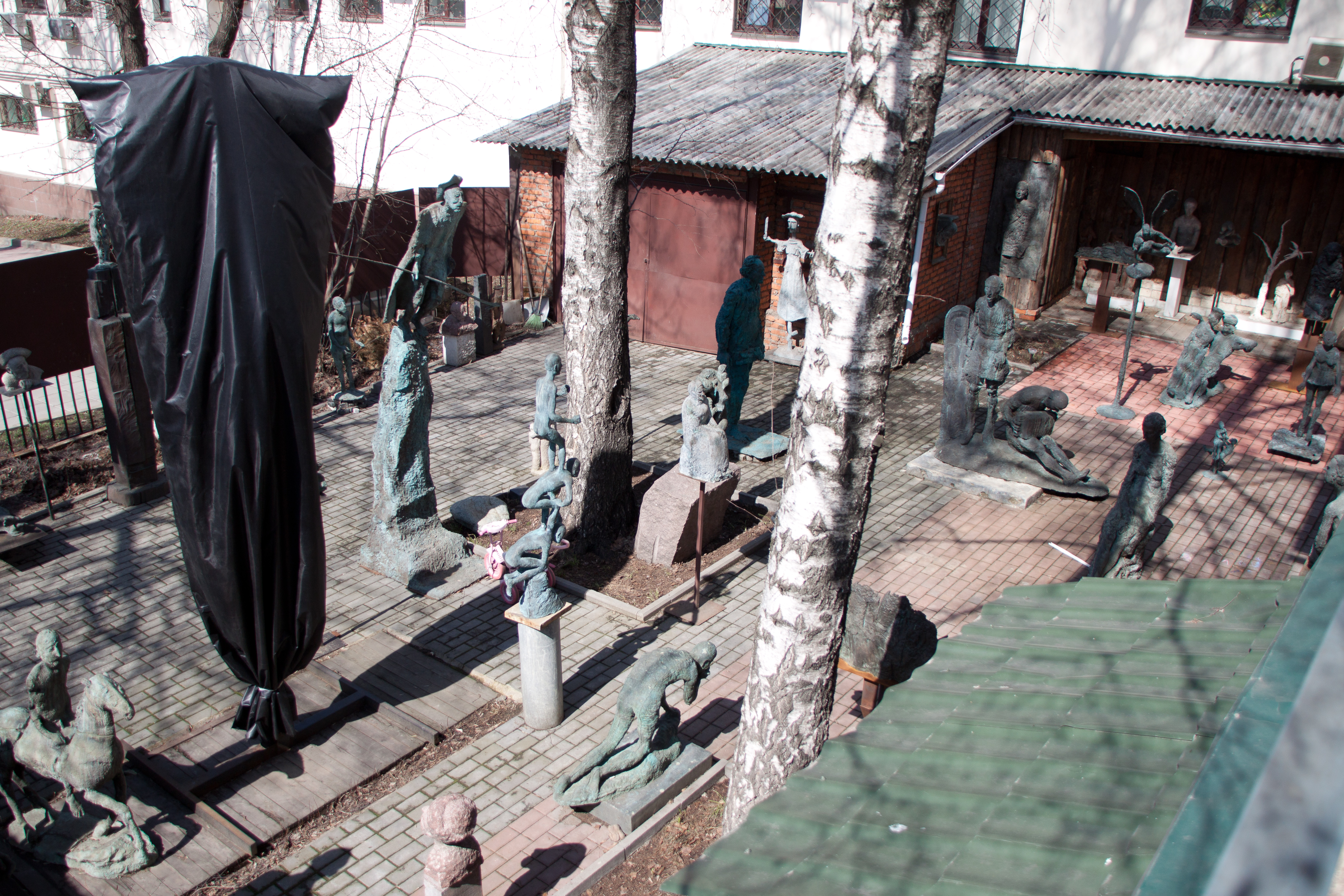 Работы Владимира Соскиева во дворе мастерской (снято и опубликовано с разрешения автора)